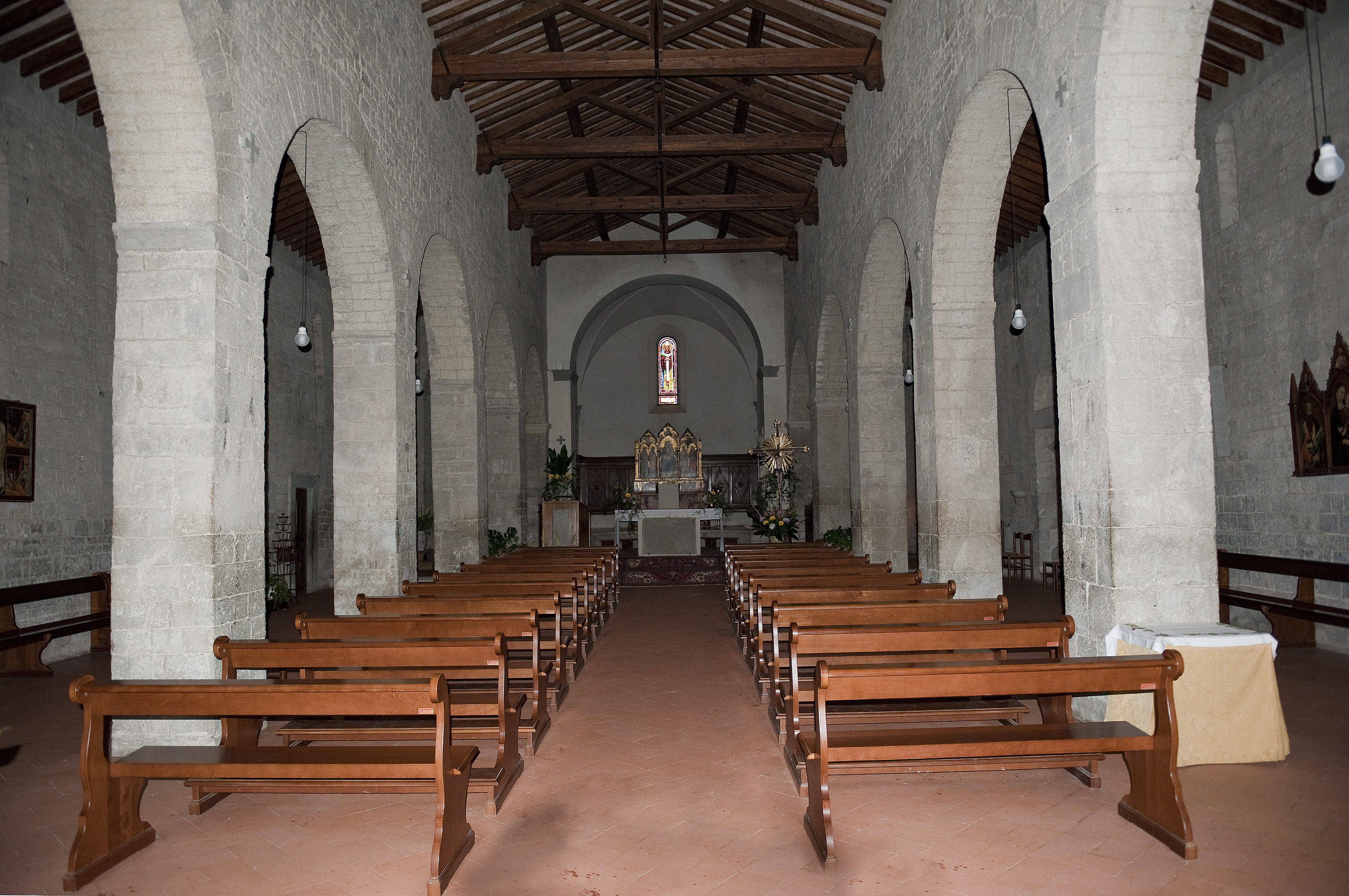 Interno della Pieve di san Leolino a Panzano in Chianti